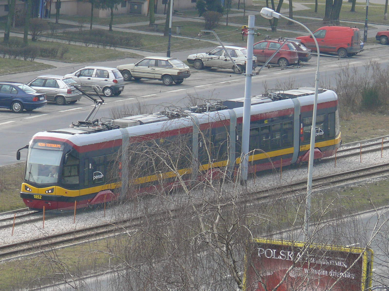 Tramwaj Pesa 122N na ulicach Łodzi (tor 1000 mm).